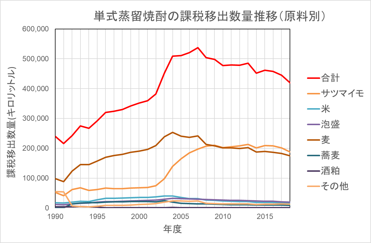 日本酒造組合中央会 単式蒸留しようちゆう課税移出数量（年度別・原材料別・度数別）を基にExcelで新規作成